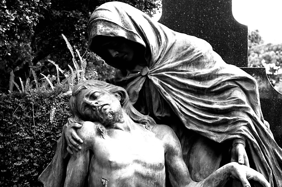 Pieta, por Fernando Furlanetto